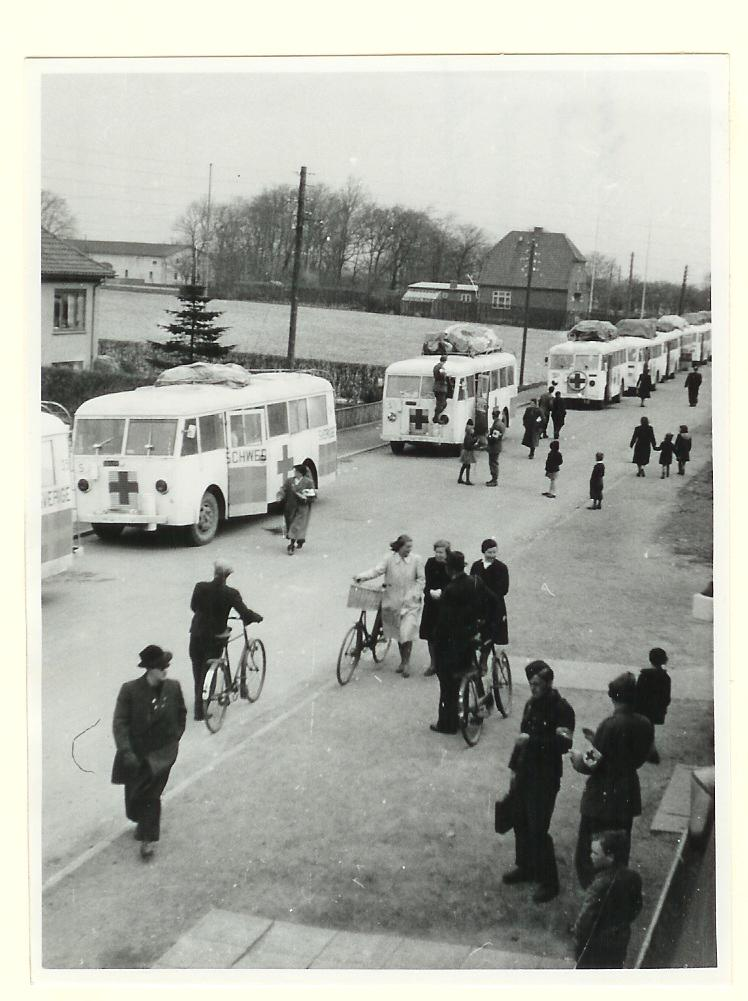 Svenske Røde Kors busser ankommer til Padborg d. 17. april 1945 med 423 jøder fra ghettobyen Theresienstadt i Tjekkiet under Bernadotte-aktionen Dato: Taken on 17 April 1945 Sted: Åbenrå Amt, Padborg Se flere billeder her: Download and rights: More about The Museum of Danish Resistance (Frihedsmuseet)